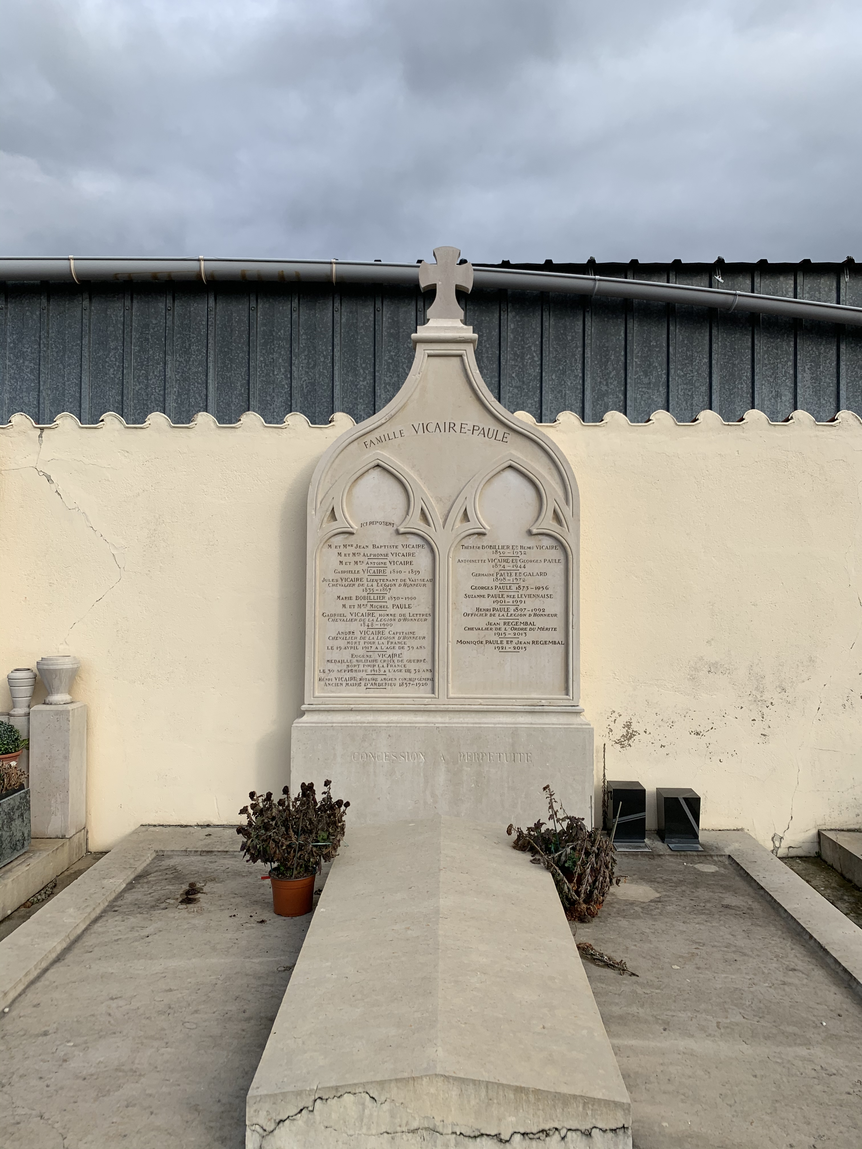 Tombe de la famille Vicaire-Paule au cimetière d'Ambérieu-en-Bugey.